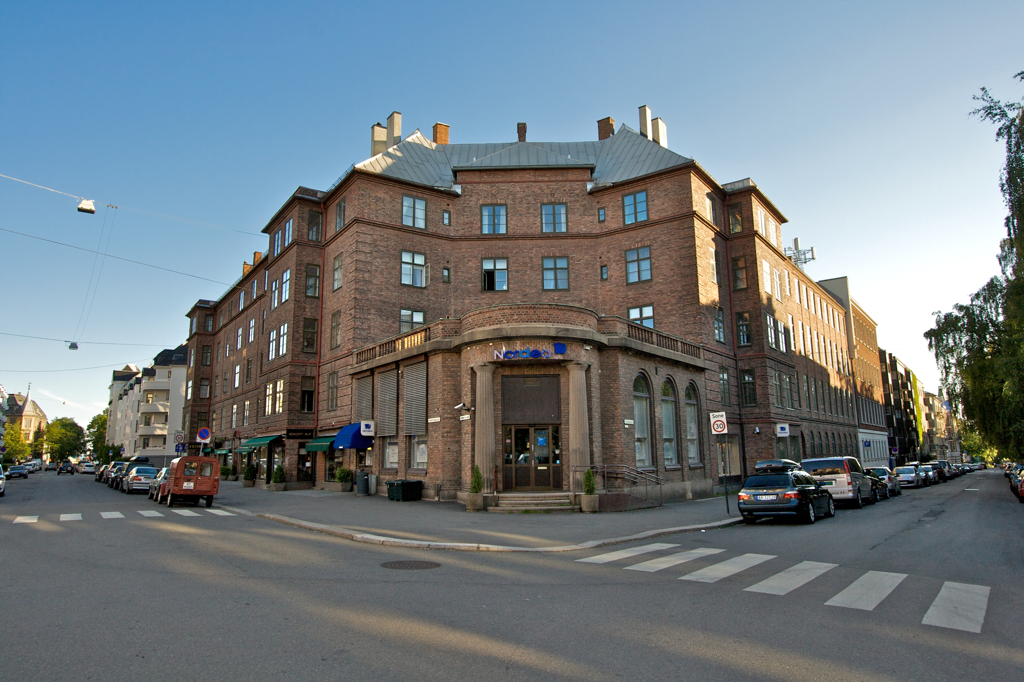 Nordea - Frognerveien 36, Frogner i Oslo. Arkitekter: Ekman, Smith & Michalsen (1920).